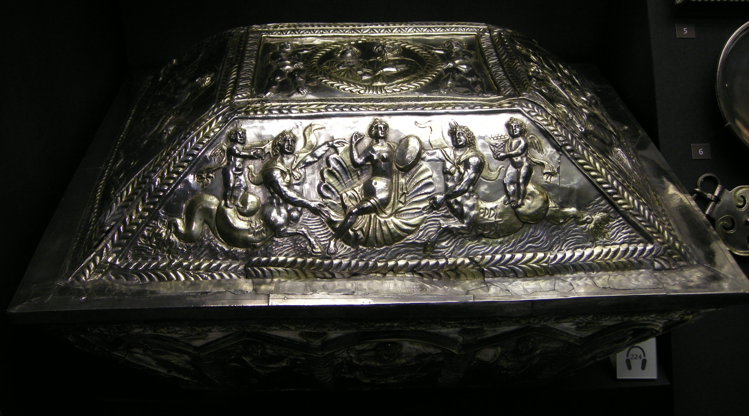 Arte tardoantica da roma, caschetto di projecta, 380 circa